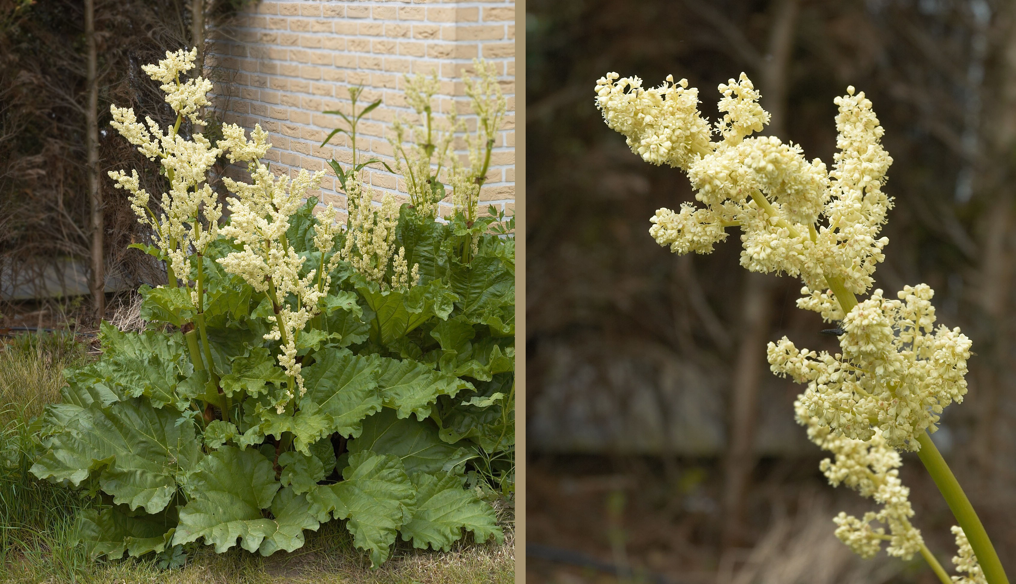 Rheum rhaponticum / rhubarb